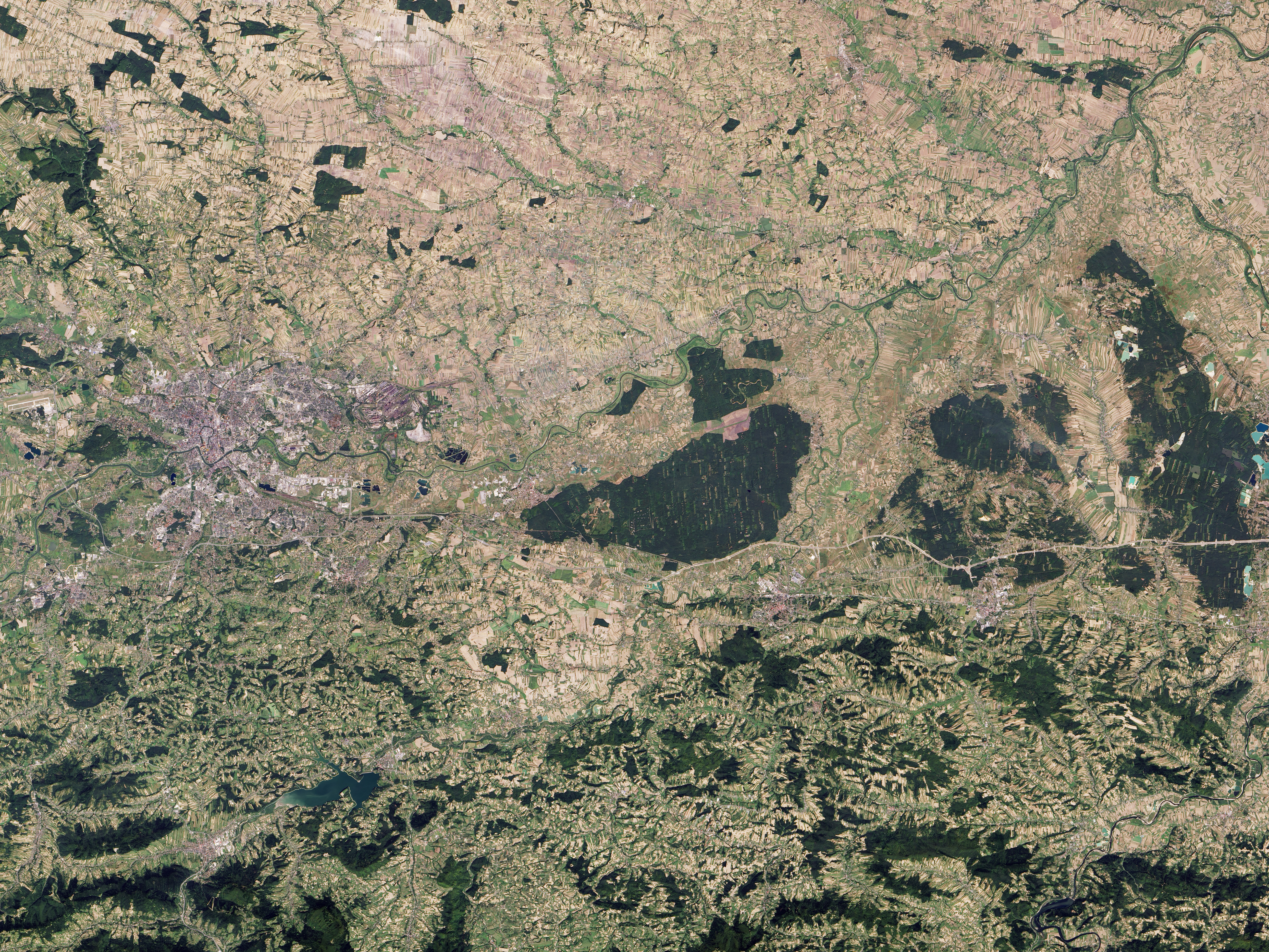 Zdjęcie wykonane przez instrument OLI satelity Landsat 8 w dniu 8 września 2013 roku. Od lewej widoczne: aglomeracja Krakowa, Nowa Huta (północ) i Wieliczka (południe), Niepołomice i Puszcza Niepołomicka, a także Bochnia i Brzesko, i Lasy Redłowskie (przy prawej krawędzi) Duży zbiornik wodny u dołu zdjęcia - Jezioro Dobczyckie.